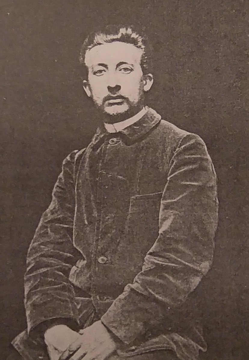 André Vermare, Suclpteur, 1898